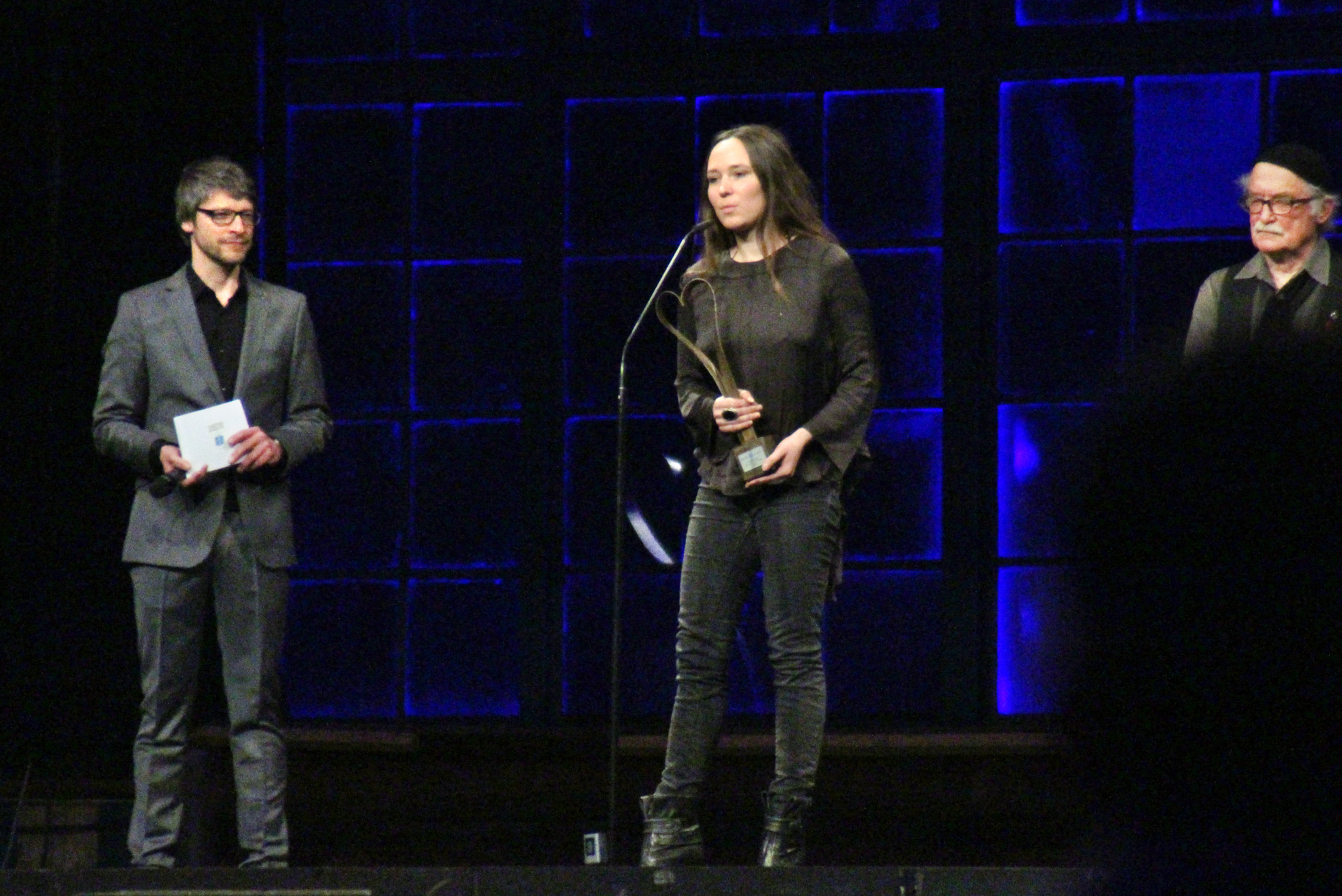 Andrea Roggon bei ihrer Dankesrede zum Förderpreis der DEFA-Stiftung für ihren Film Mülheim – Texas. Helge Schneider hier und dort beim Filmfestival Max-Ophüls-Preis 2015